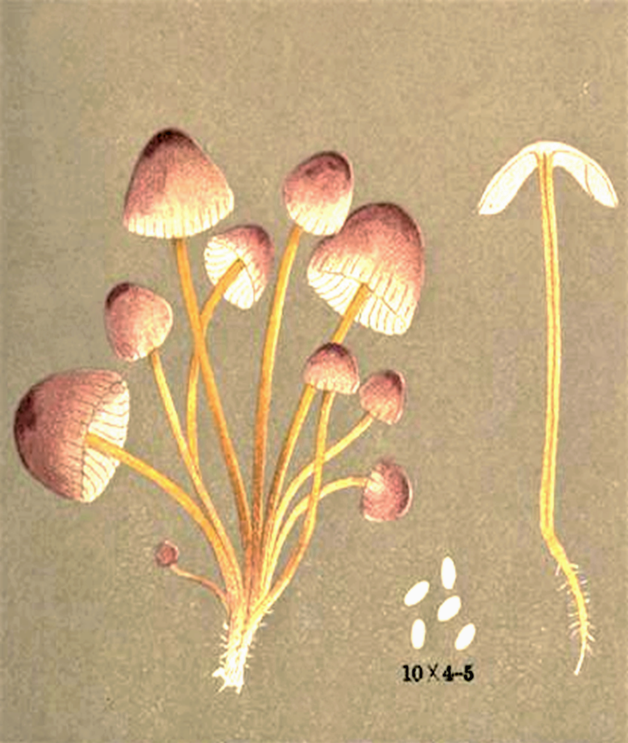 Mycena renati Quél. (1886) Syn. Mycena flavipes Quél. 1873